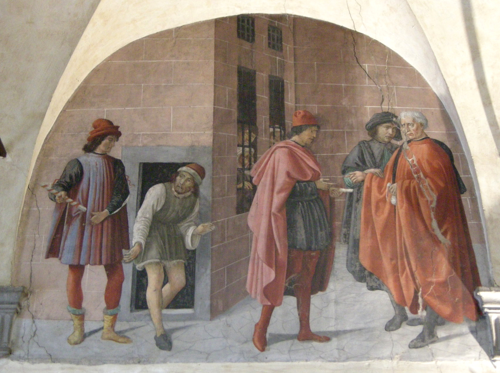 Oratorio dei buonomini di s. martino, lunette di Francesco d'Antonio, visitare i carcerati